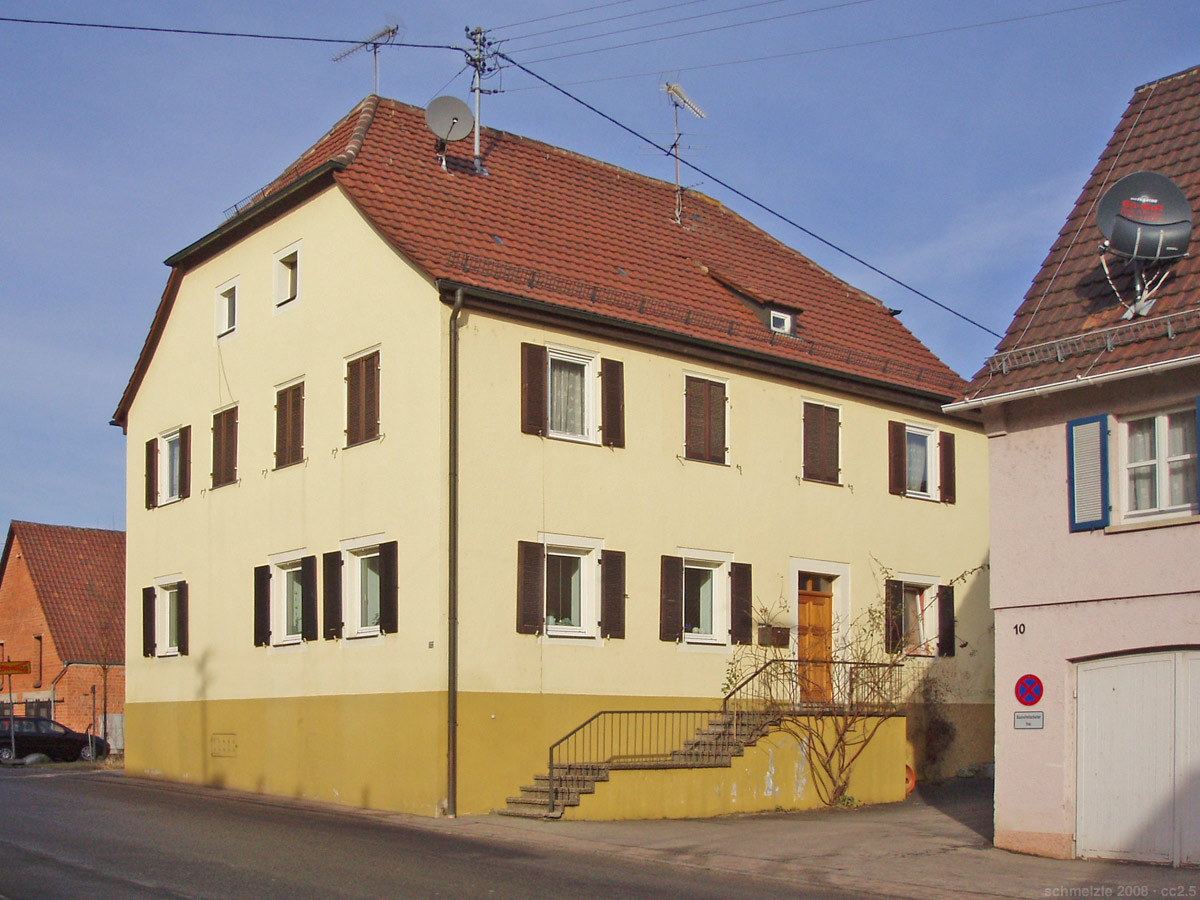 Historisches Gebäude Bonfelder Str.12 in Heilbronn-Biberach